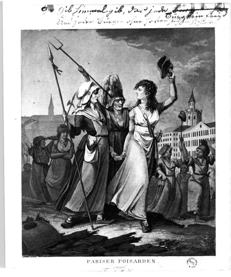 "Pariser Poissarden sonst Fisch-Weiber": Darstellung des Zugs der Poissarden von Paris nach Versailles während der Französischen Revolution, am 5./6. Oktober 1789. "Gib Himmel gib, daß jede Bürgerin frey / Und jeder Bürger ohne Hosen sey."